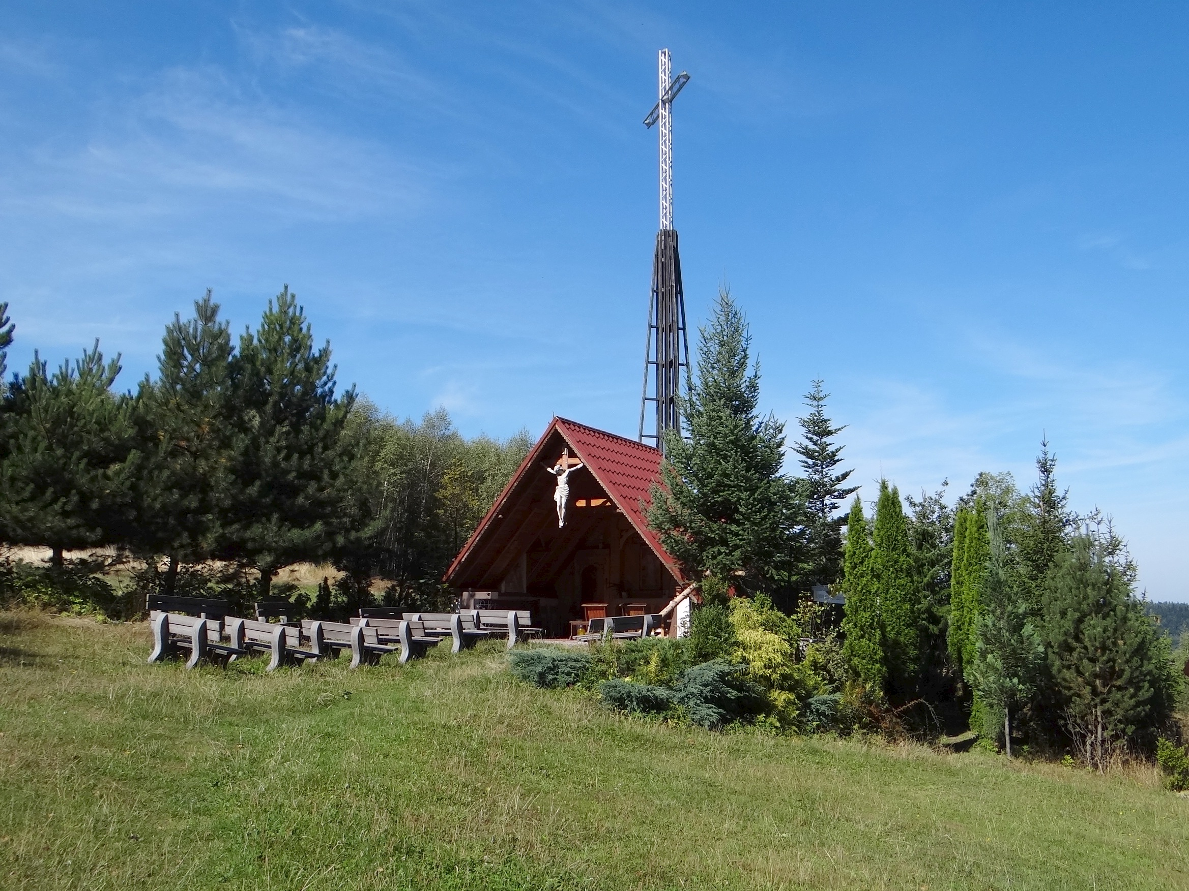 Sanktuarium na Wzgórzu Miłosierdzia w Zagórniku